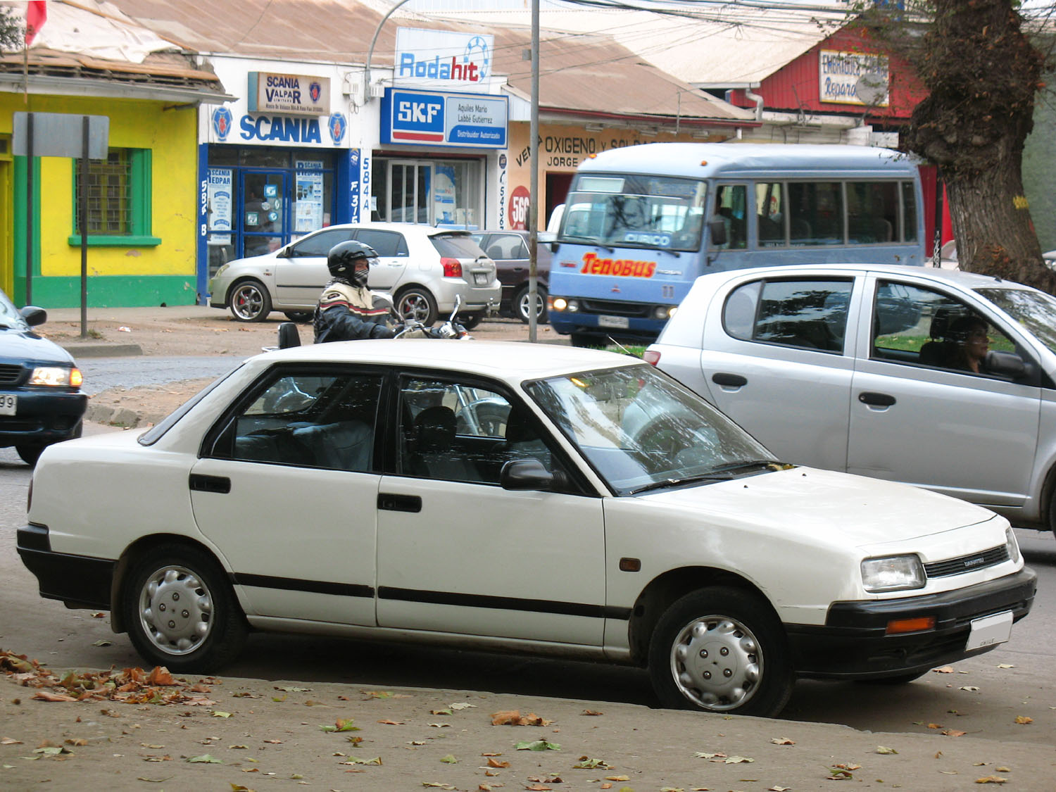 Daihatsu Applause 1.6 L l.